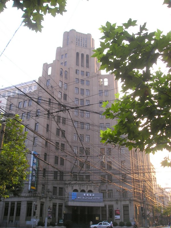 中文（中国大陆）: 都城饭店